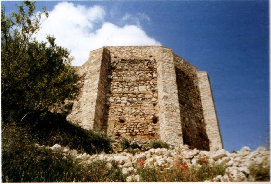 Abside de la Iglesia Mayor despues de la excavación